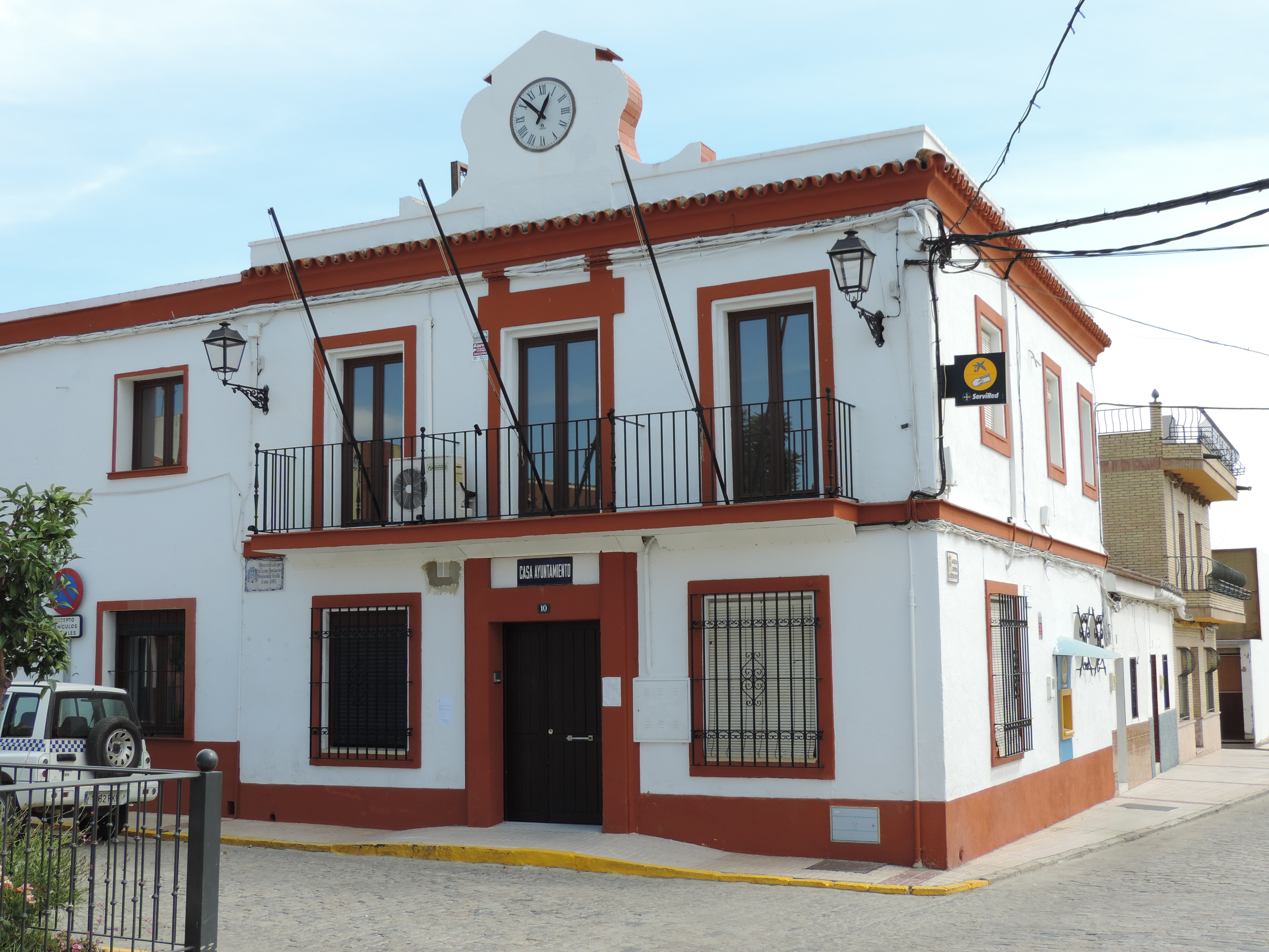 El Garrobo